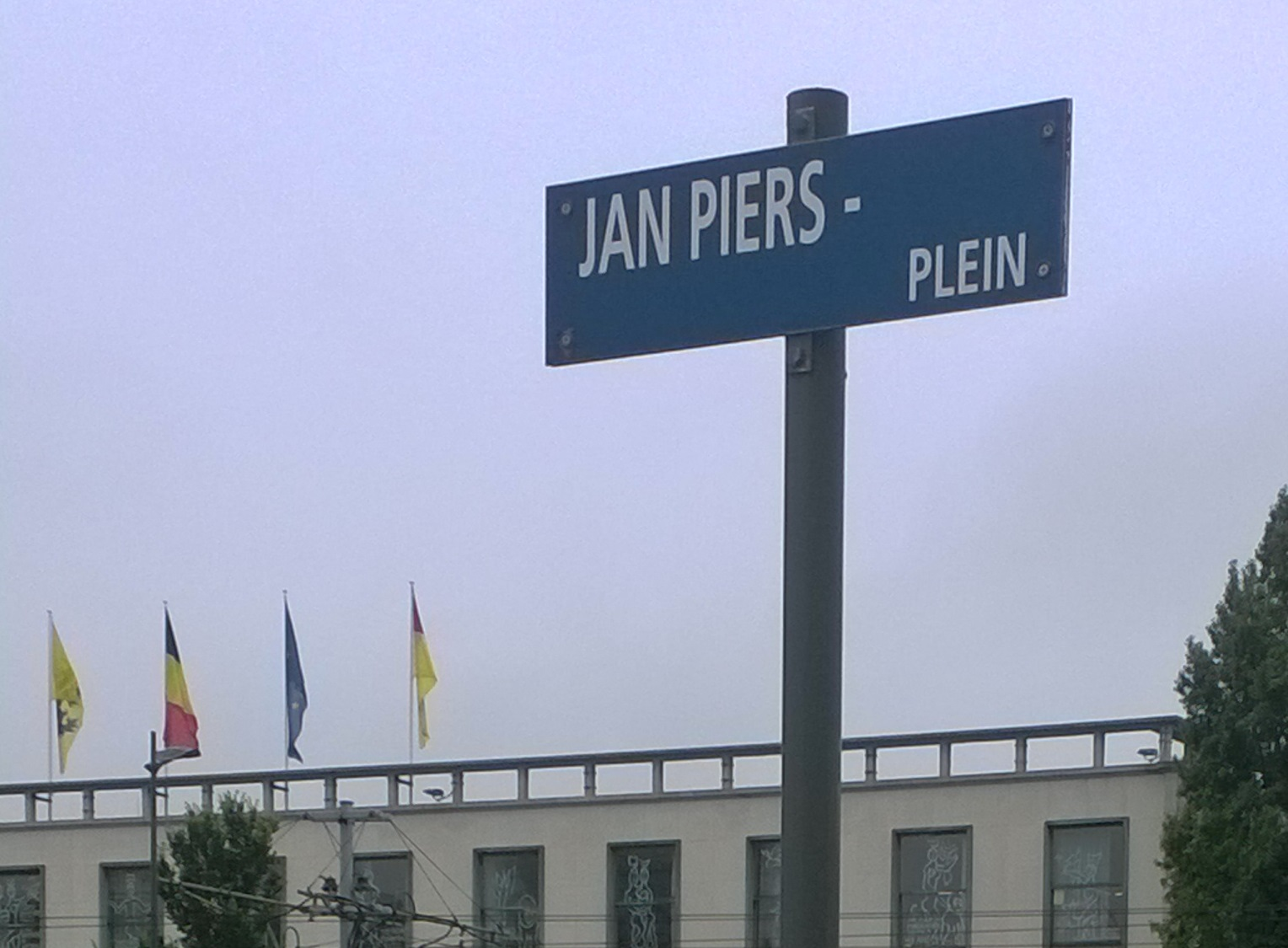 Oostende straatnaambordje Jan Piersplein